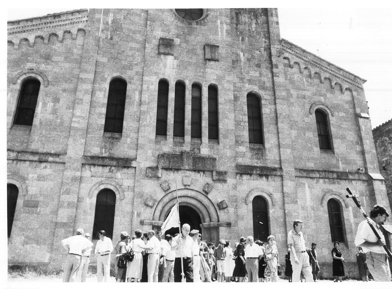 Carlins al santuari del Collell. Sant Miquel de Campmajor